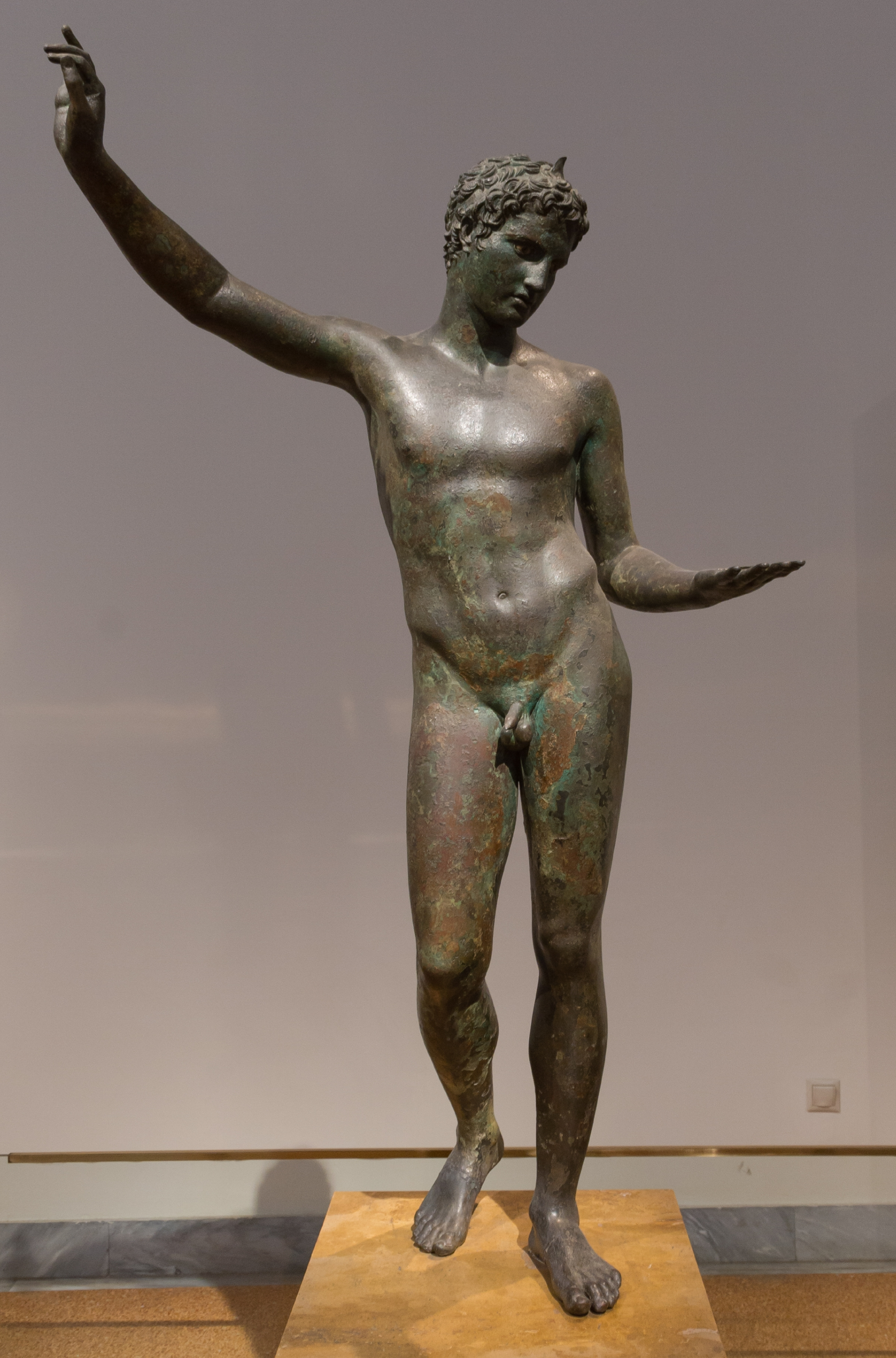 L'éphèbe de Marathon : statue en bronze d'un jeune athlète, trouvée dans la mer face à Marathon, Attique. Un des chefs d'oeuvre de la période classique tardive, associée à l'école de Praxitèle. vers 340 - 330 av. J.-C.